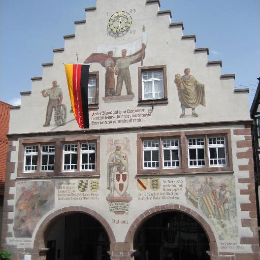 Das Schiltacher Rathaus nach der Fassadensanierung im Frühling 2006.